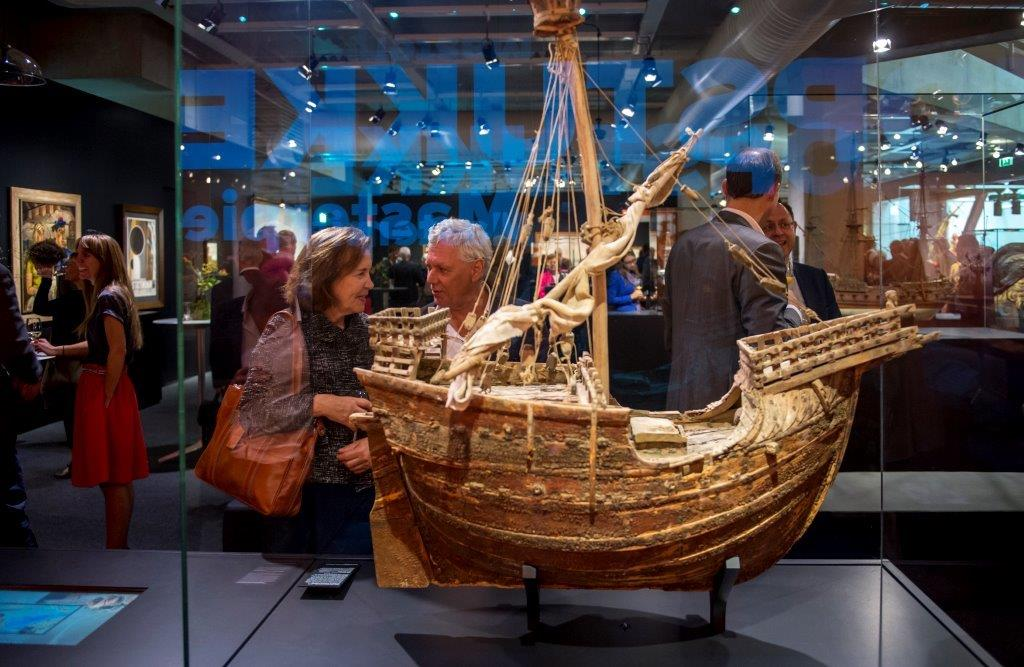 Foto van het Mataró Model